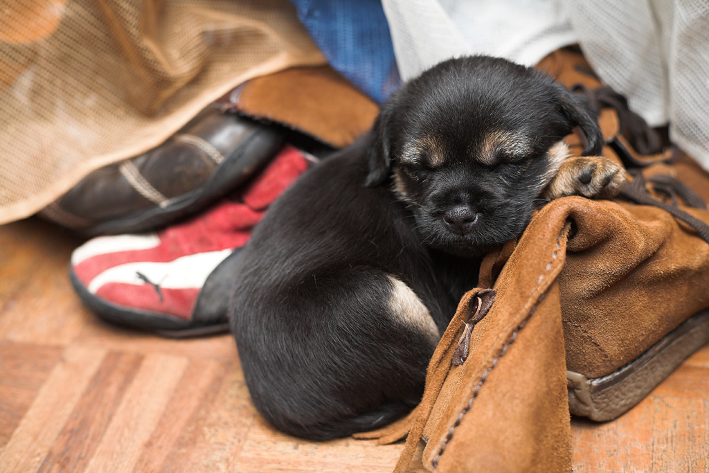 Border Terrier puppy